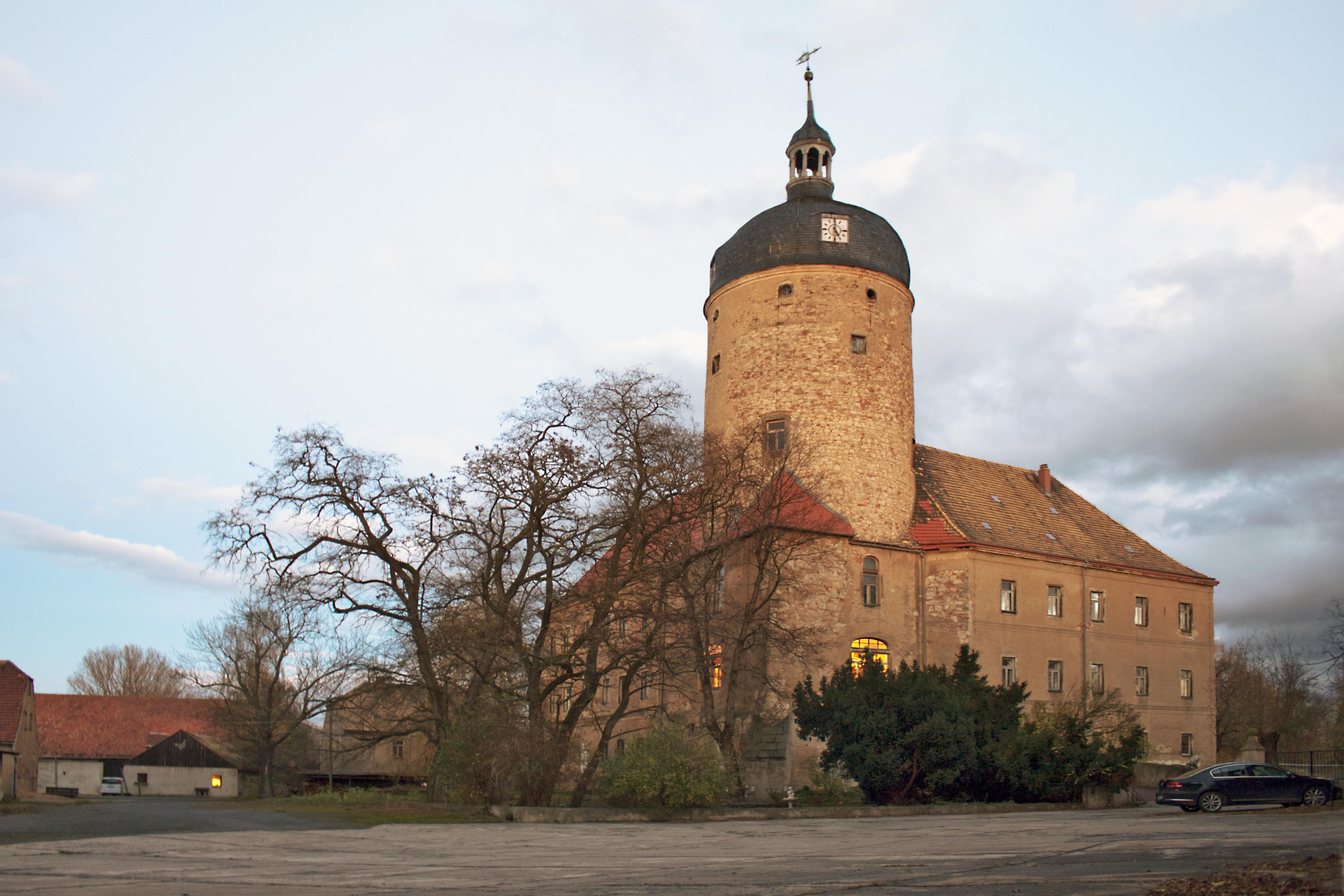 Schloss Ruhethal Feuerwehrplatz 1, 2 in Mügeln